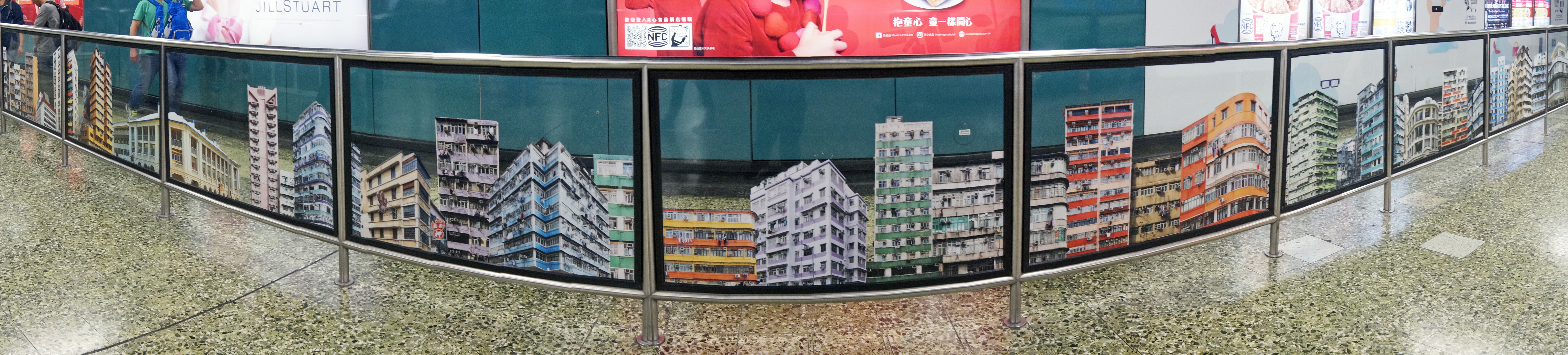 港鐵深水埗站藝術品